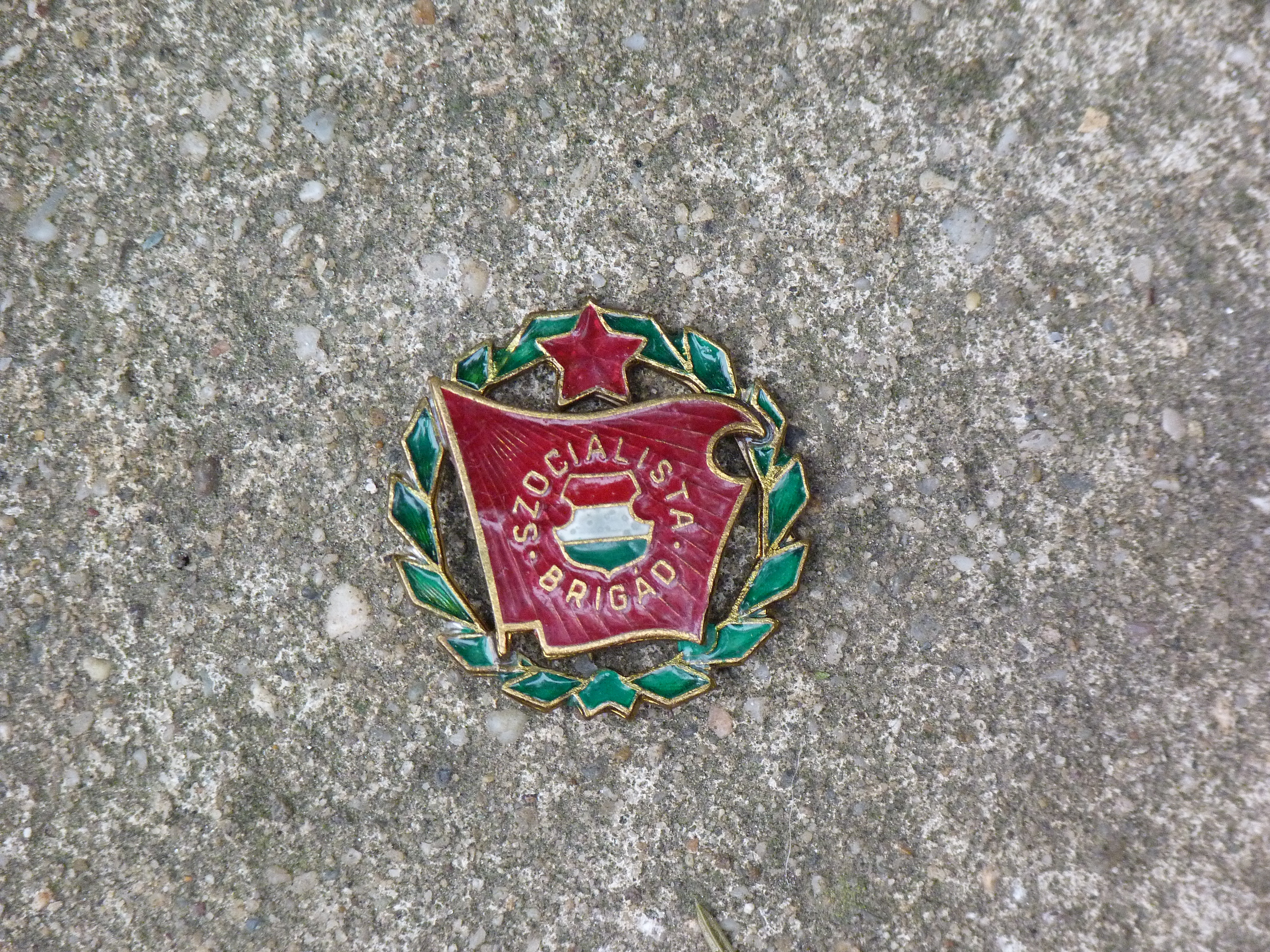 A felvétel 2015. január 9-én, pénteken készült Budapesten. Jelvény: Szocialista Brigád. ©© Derzsi Elekes Andor, Budapest, 2015, A kép másolását, bármilyen úton történő sokszorosítását és felhasználását a szerző ellenérték nélkül, jogutódjaira is kihatóan megengedi. Az engedély kiterjed a kereskedelmi célú hasznosításra is. Kéri azonban nevének feltüntetését a felhasználás során. A Metapolisz sorozat valamennyi képe és filmje Creative Commons alatti valamint kereskedelmi - for profit - célra is felhasználható. Ajánlott hivatkozás: Derzsi Elekes Andor: Metapolisz DVD line